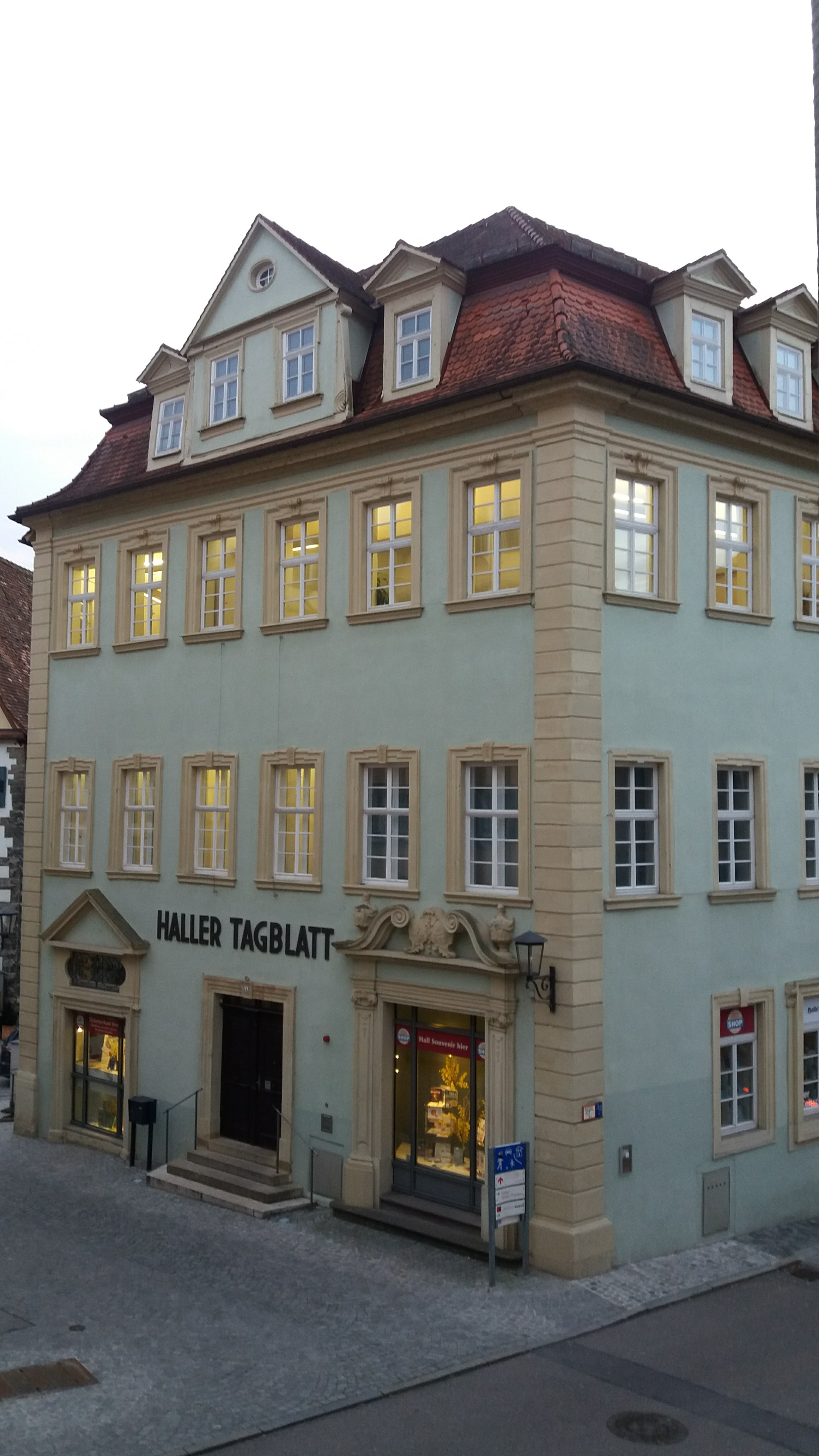 Barocke Pracht über alten Kellern Besitzer 1827 Schwend, David Ludwig, Buchdrucker